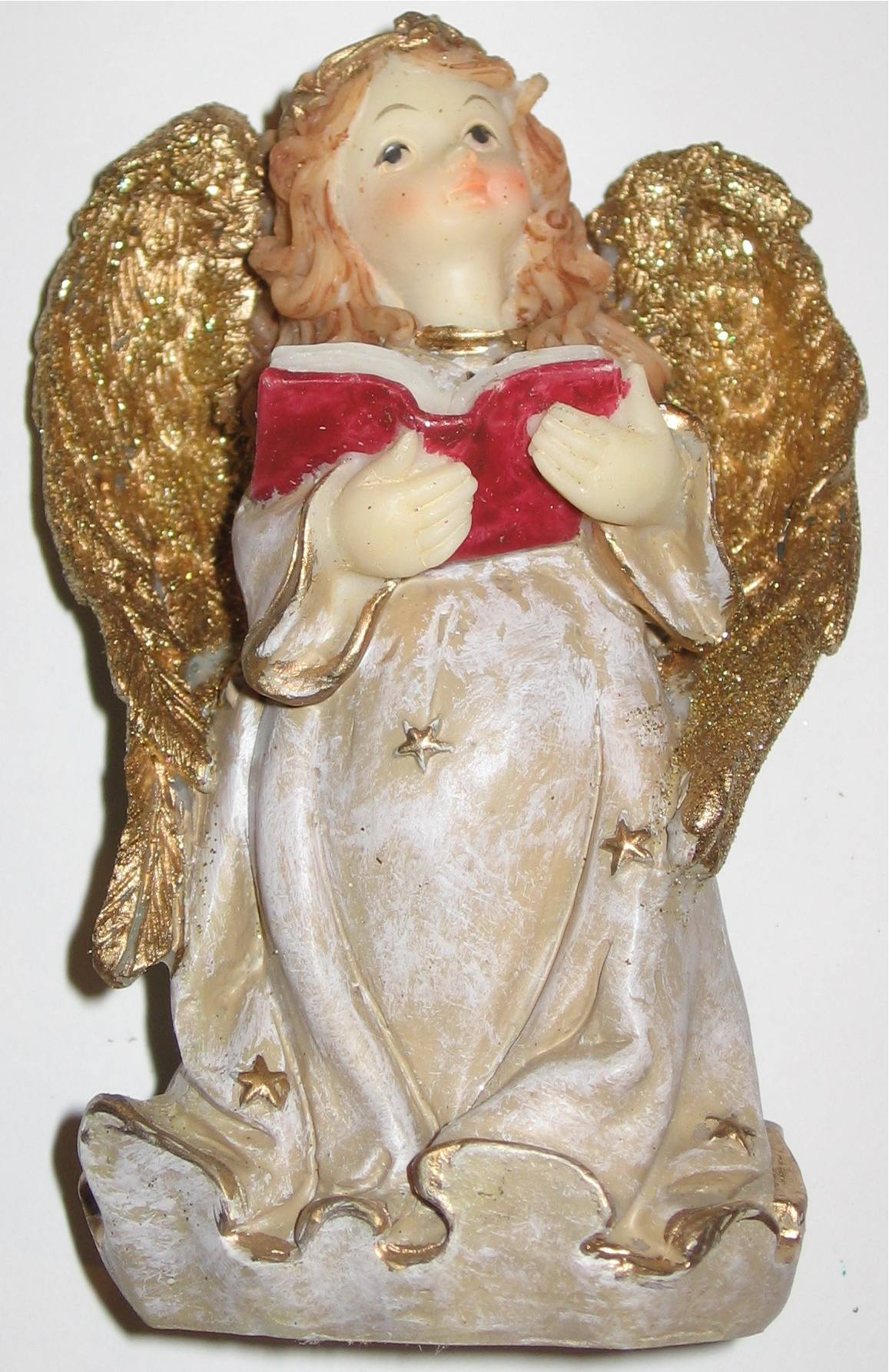 Angioletto kitsch